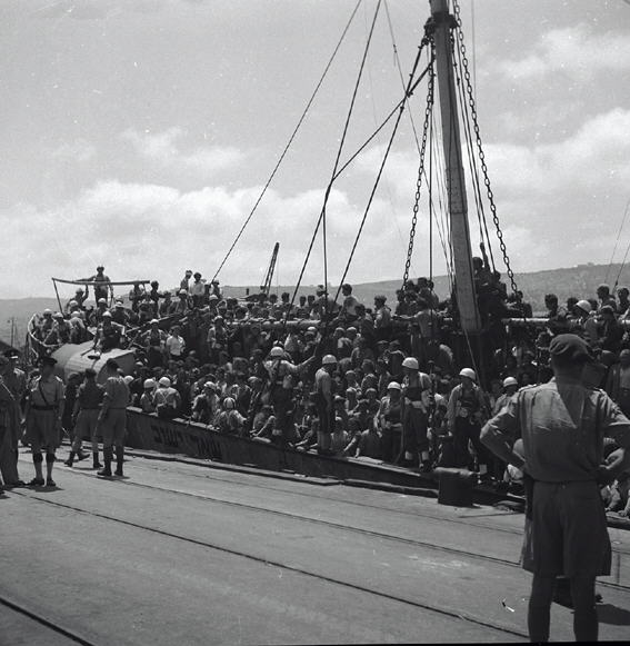 אנית המעפילים "שאר ישוב" בחוף המולדת